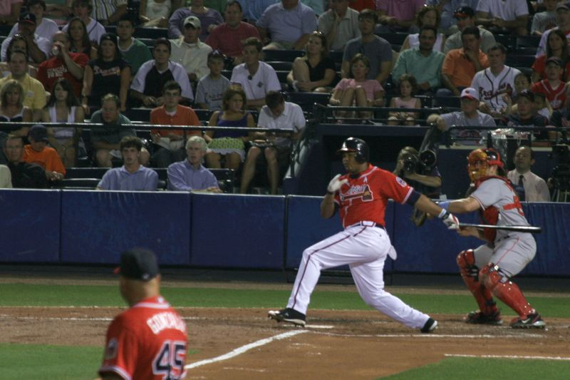 Andruw Jones